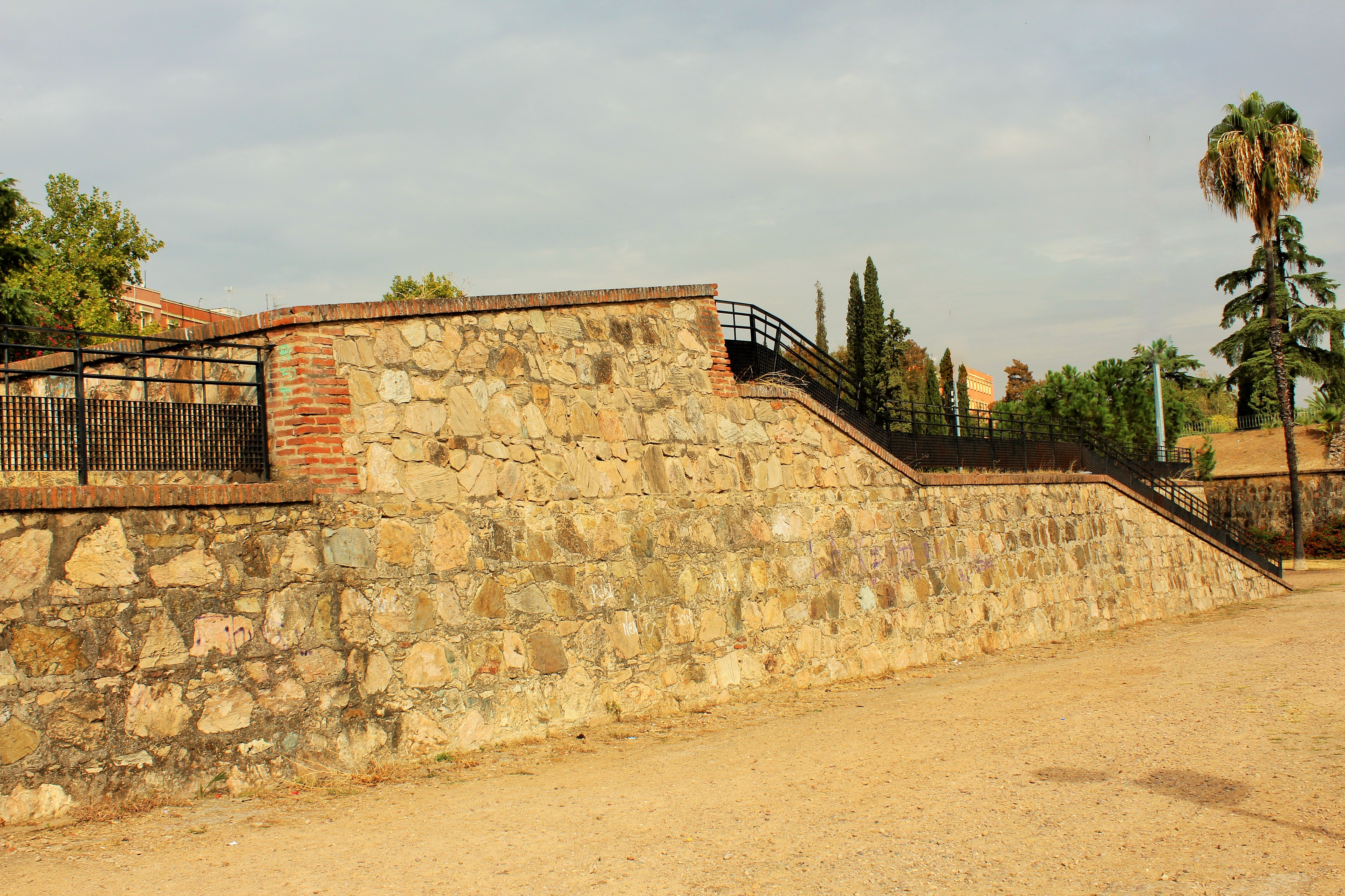 Lateral oriental del revellín.